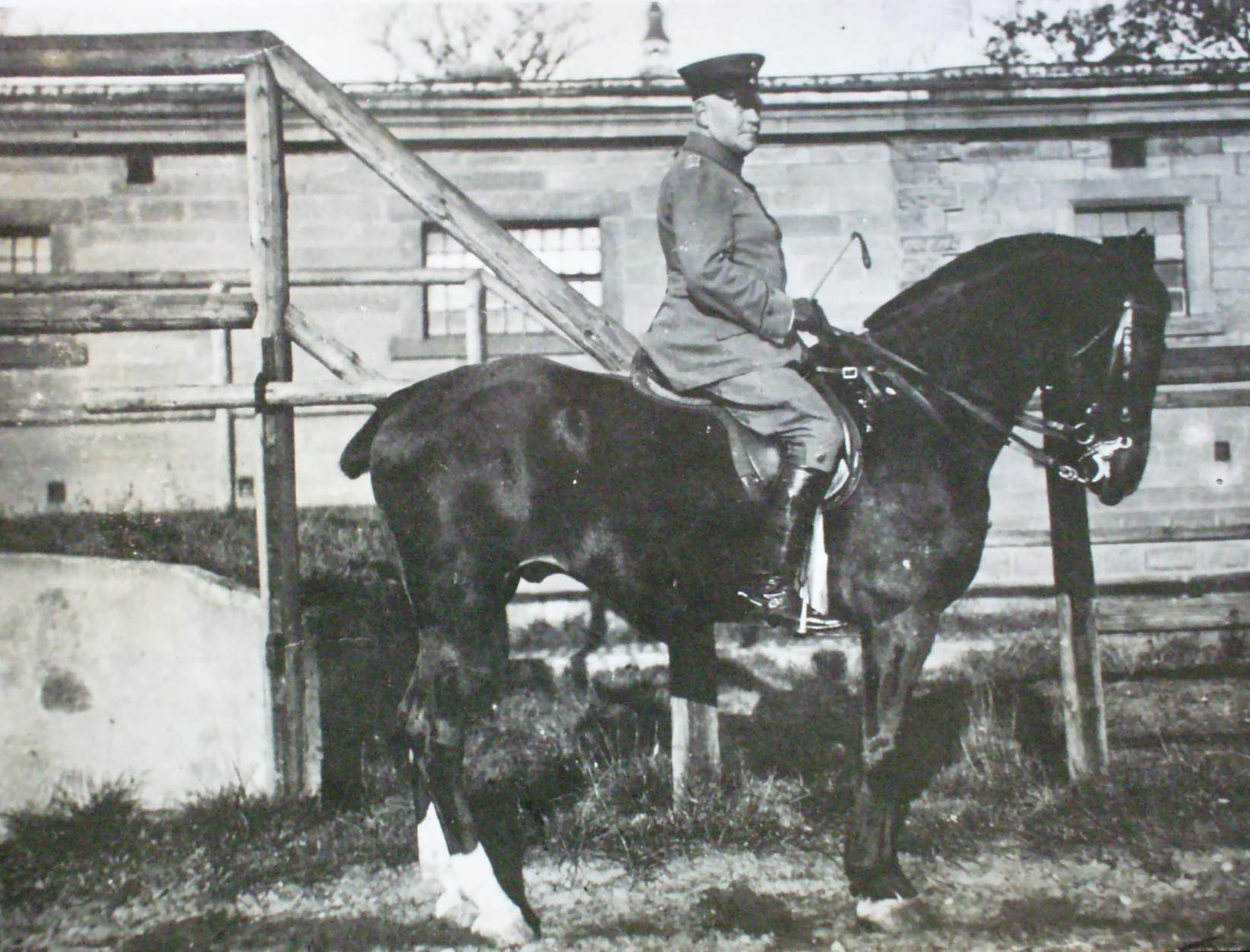 1920 Alfred ,Gustav,Eberhard,hermann,Max Von Blankenfeld (1862-1931) commandant de cavalerie